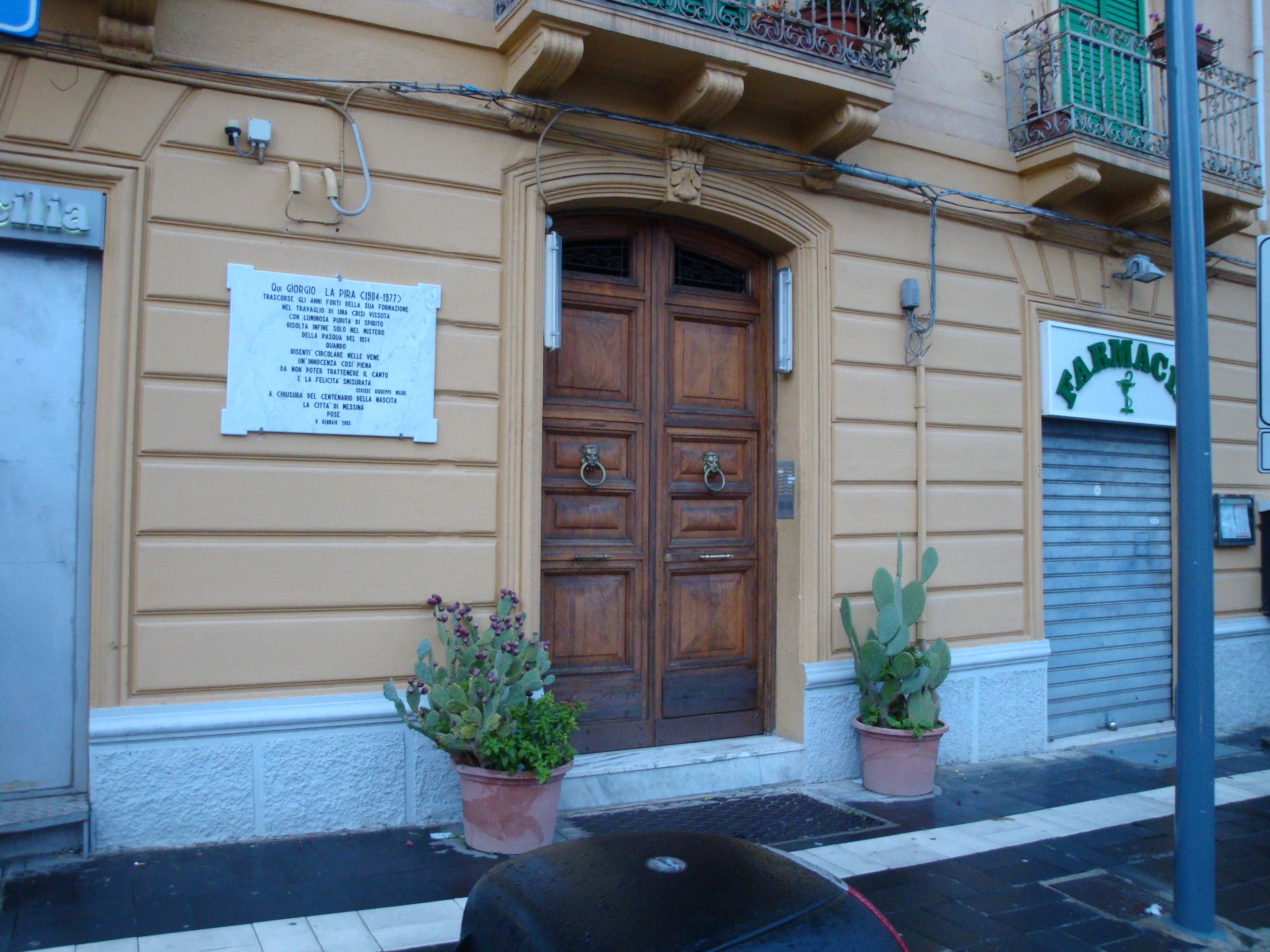 Portone d'ingresso della casa di Giorgio La Pira